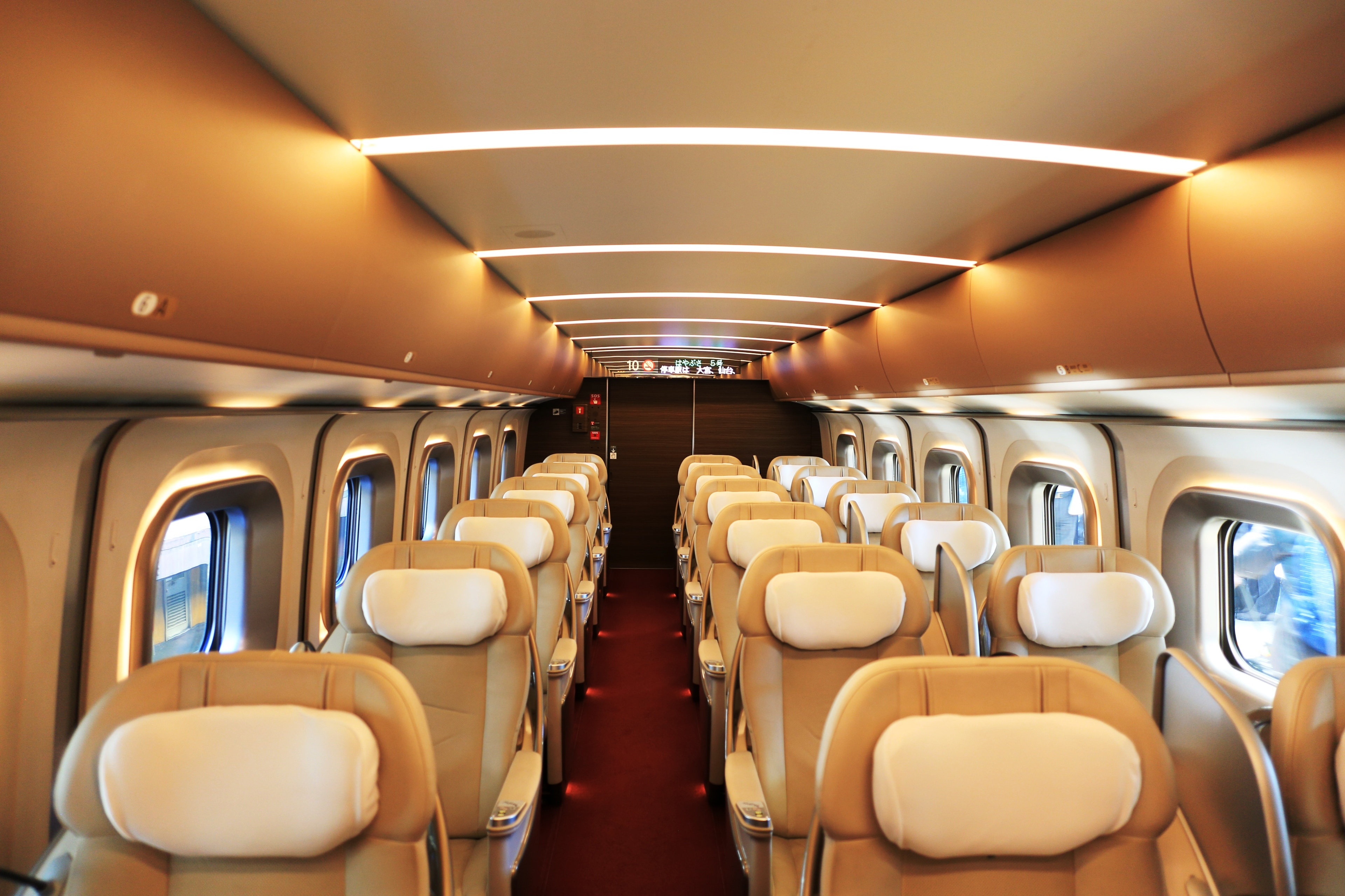 E5系グランクラス車内（はやぶさ5号）